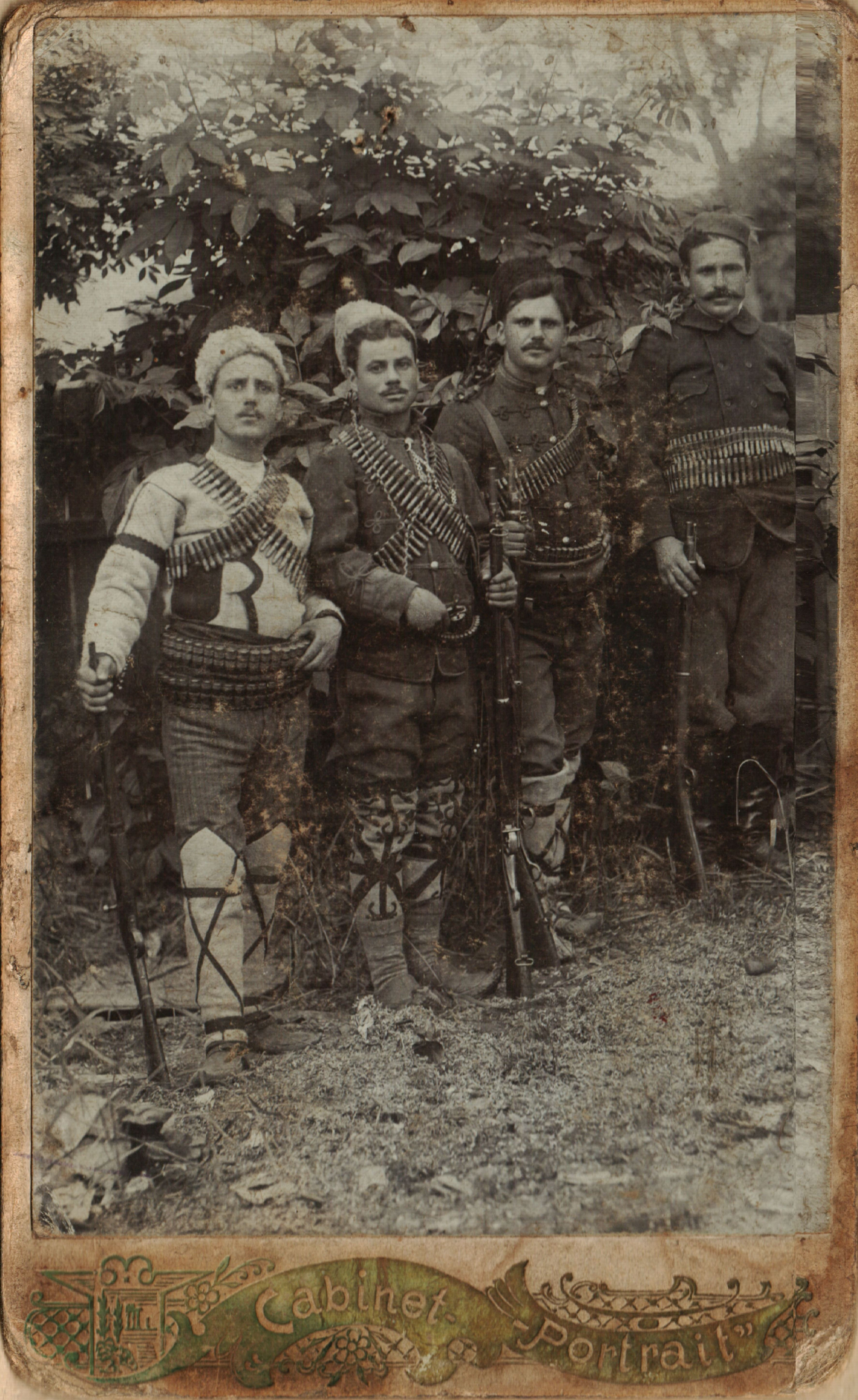 Дейците на ВМОРО Александър Старото от София, Коце Марков от Банско, Петър Китанов от Бачево и Александър Андреев Чапата от София.